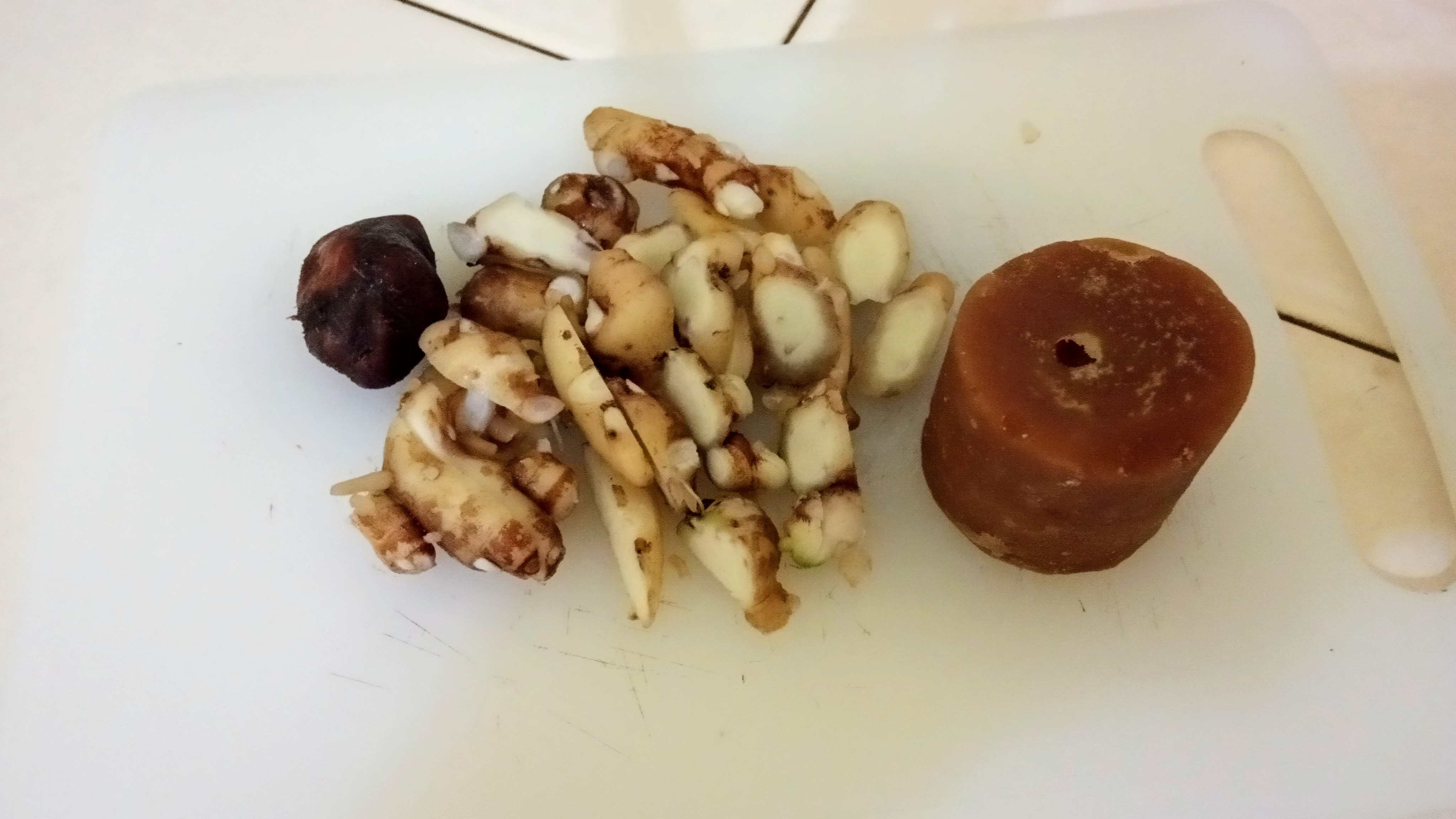 Sebagian Bahan Baku Jamu Beras Kencur